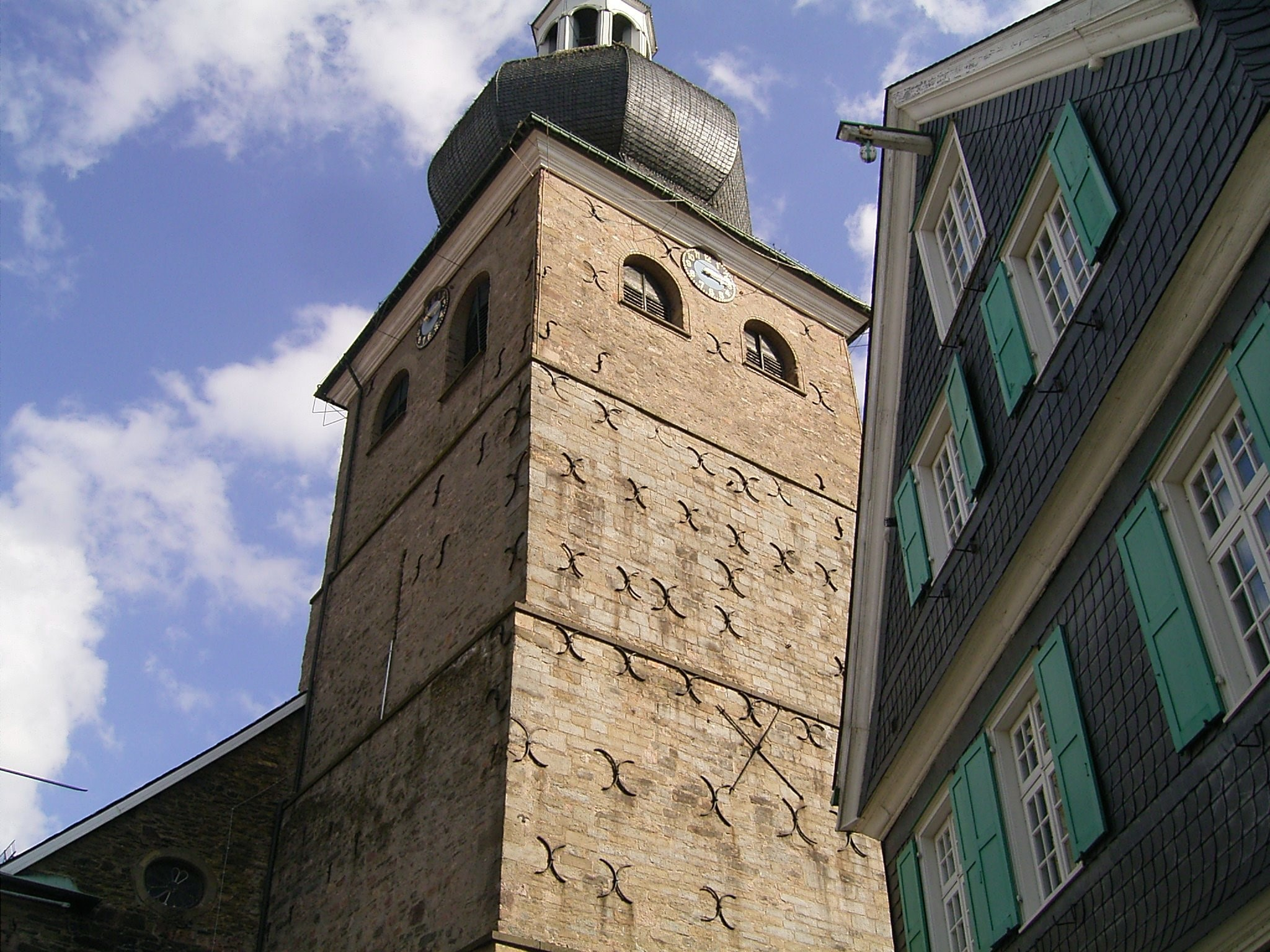 Evangelische Stadtkirche in der Altstadt von Remscheid-Lennep